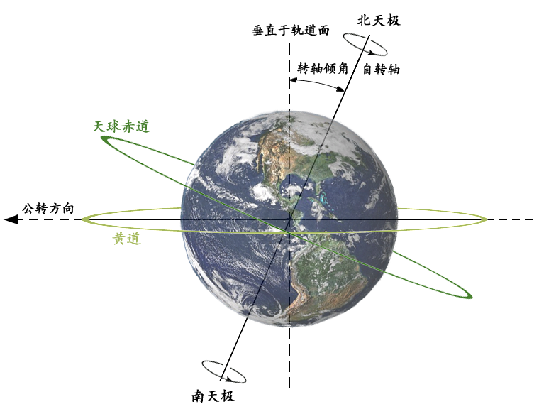 地轴倾角、自转轴、轨道面、天球赤道和黄道之间的关系。图中为从太阳观察到的地球，其中地球以逆时针方向公转（在图中即为向左）。